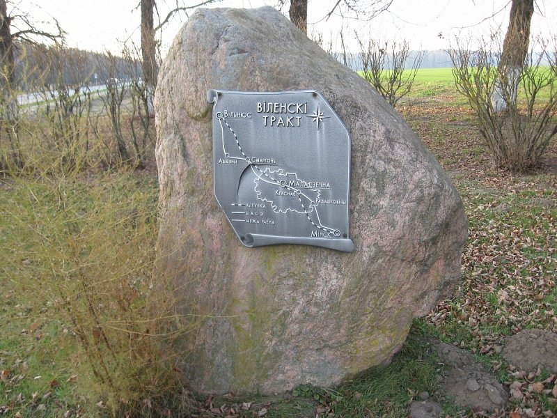 Мясата. Помнік Віленскаму тракту